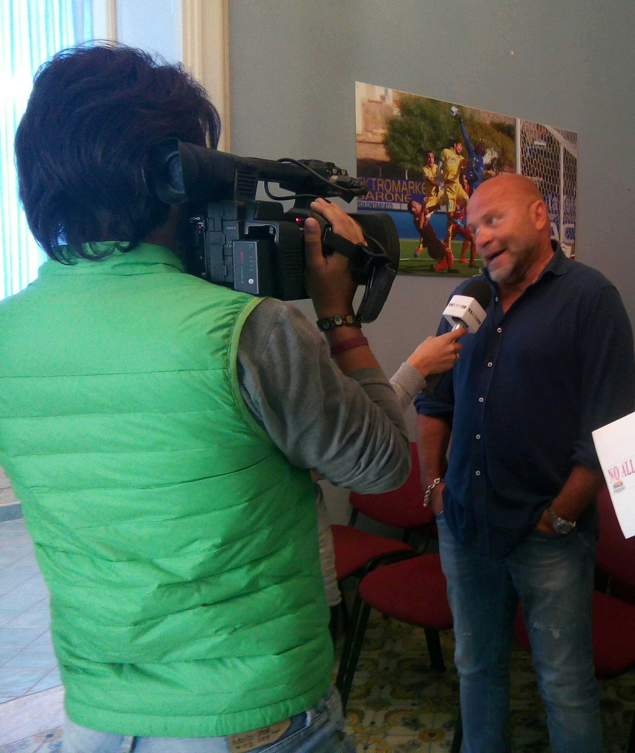 Intervista a Serse Cosmi, nella sede del Trapani calcio